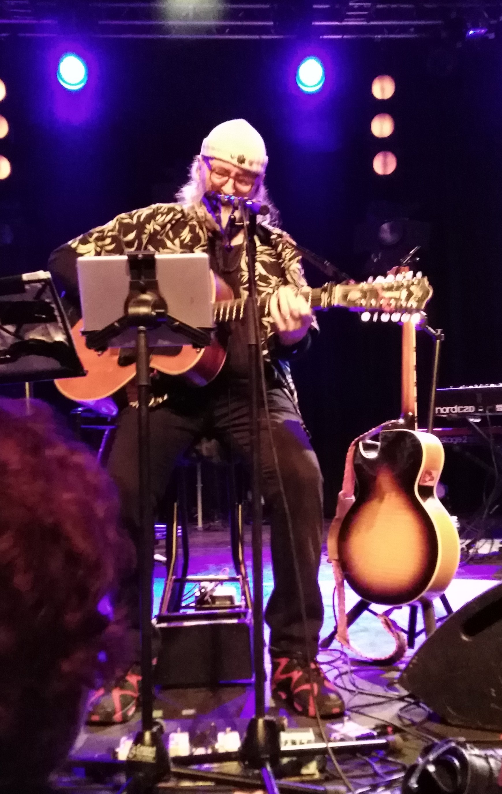 Bill Deraime au Festival de blues de Salaise-sur-Sanne en 2019